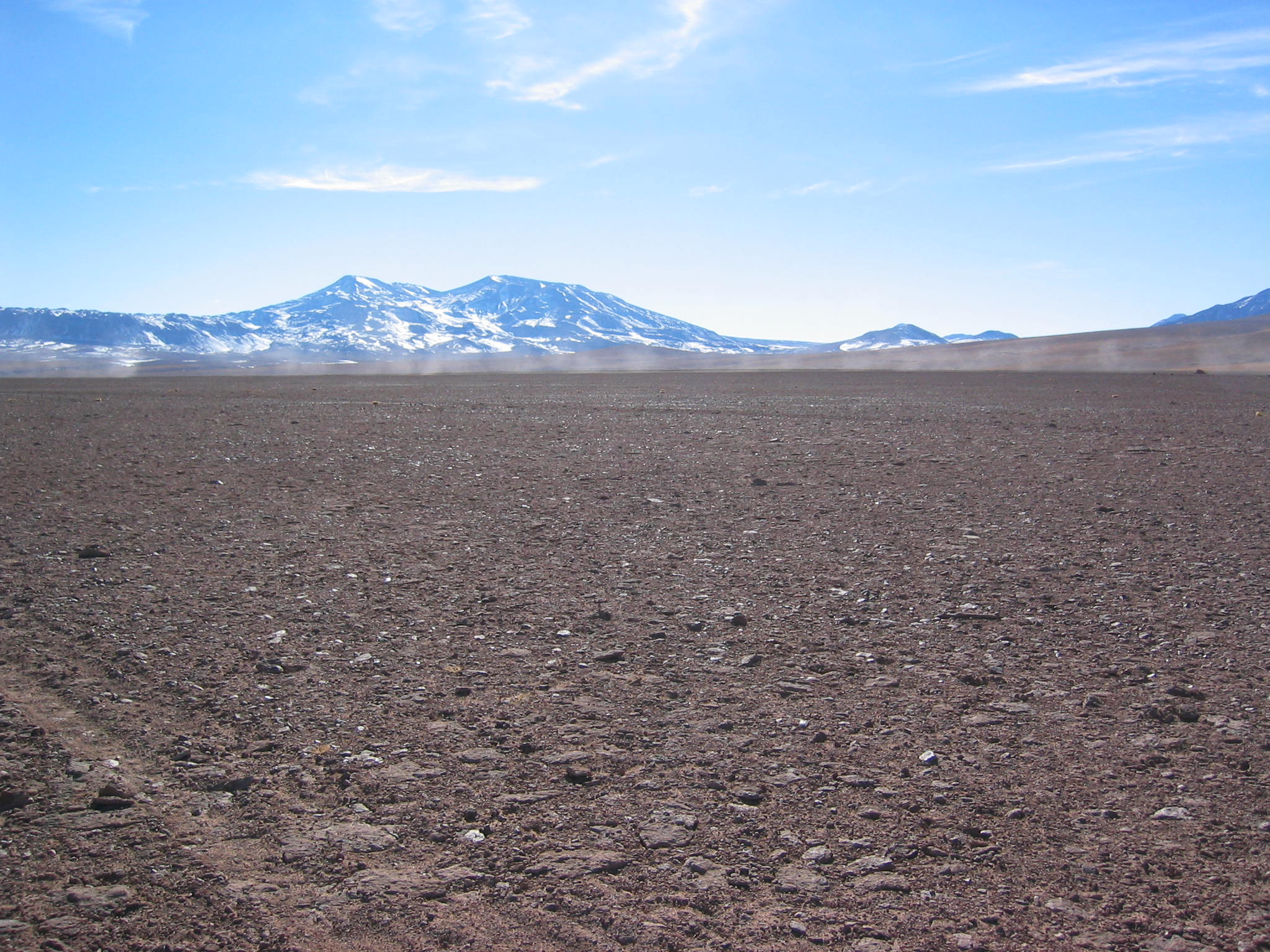 Tocorpuri and Cerro La Torta.